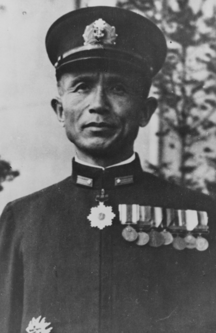 Japanese Admiral Kajioka Sadamichi